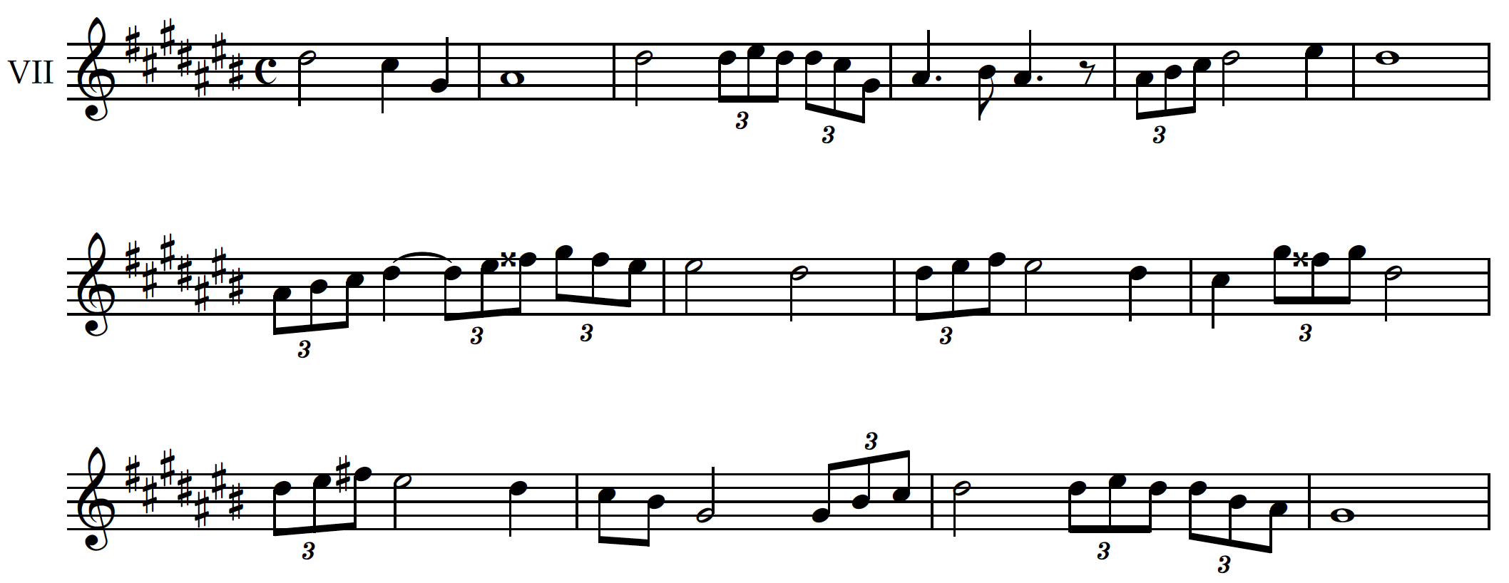 Motiu del trio 2 Gerhard